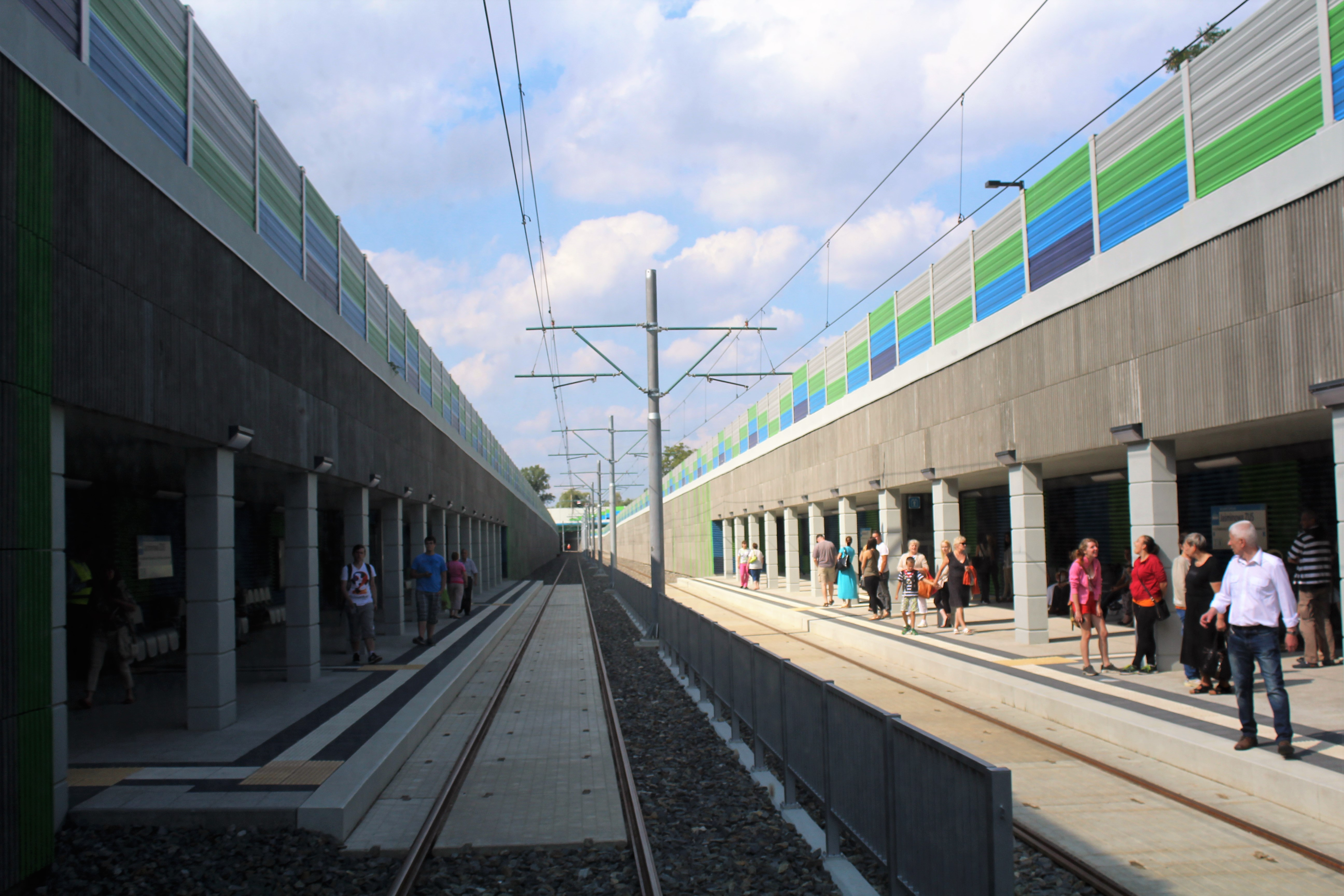 Przystanek tramwajowy Jaśminowa ZUS w Szczecinie. Uruchomiony 29.08.2015 r.